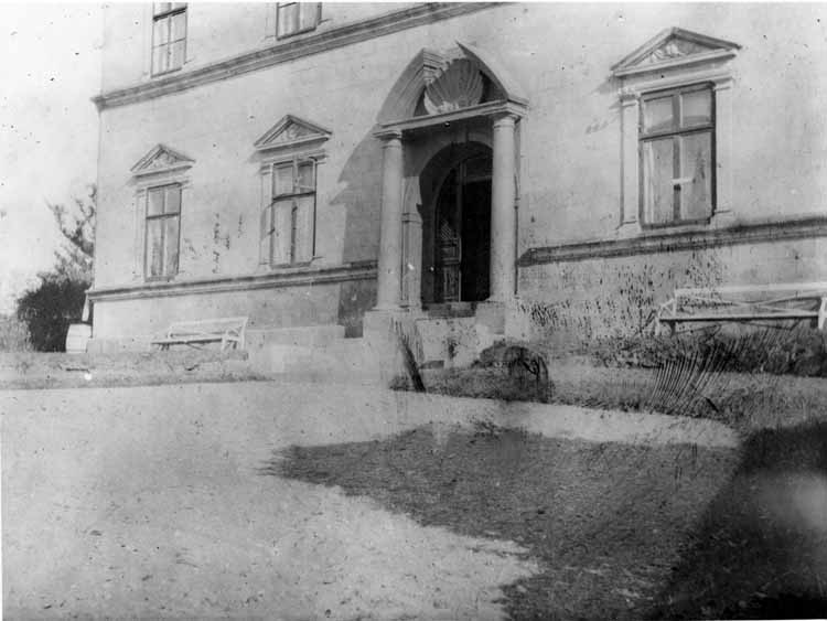 Görvälns slott, Järfälla kommun, Uppland. Huvudbyggnadens portal före ombyggnaden 1901. Snäckan, som syns ovanför portalen, ligger nu placerad nedanför terrassen/balustraden.